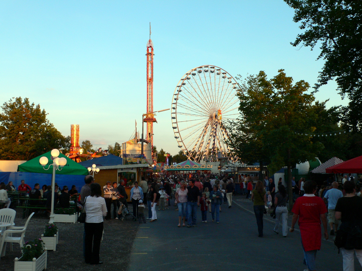 Juravolksfest in Neumarkt in der Oberpfalz